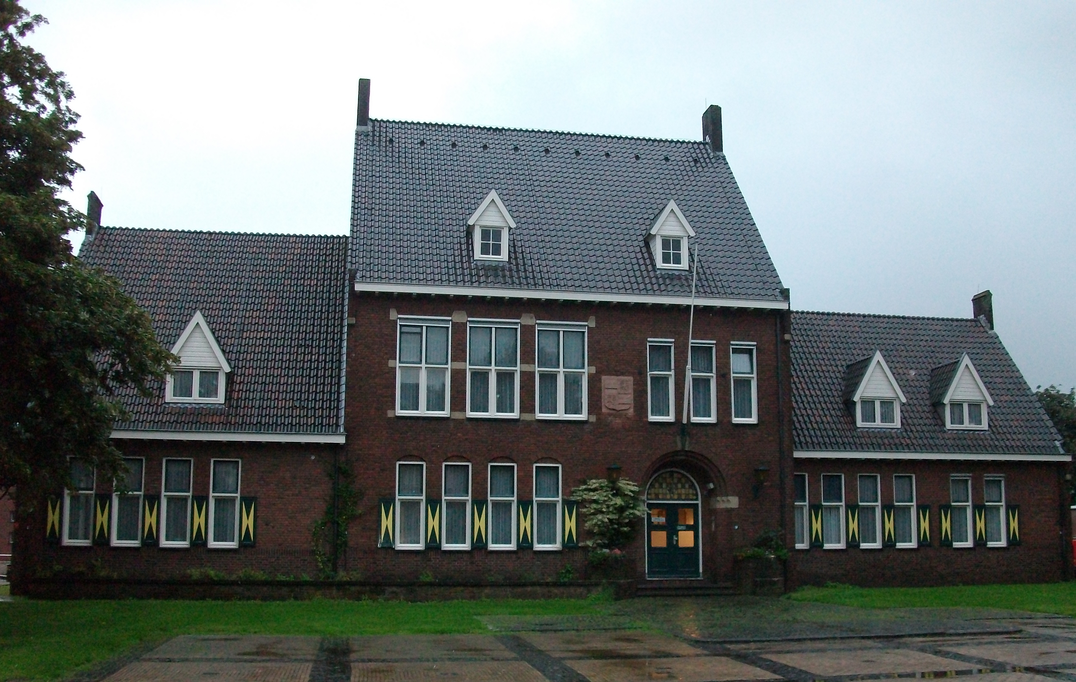 Das ehemalige Rathaus in Didam, Montferland (Niederlande)